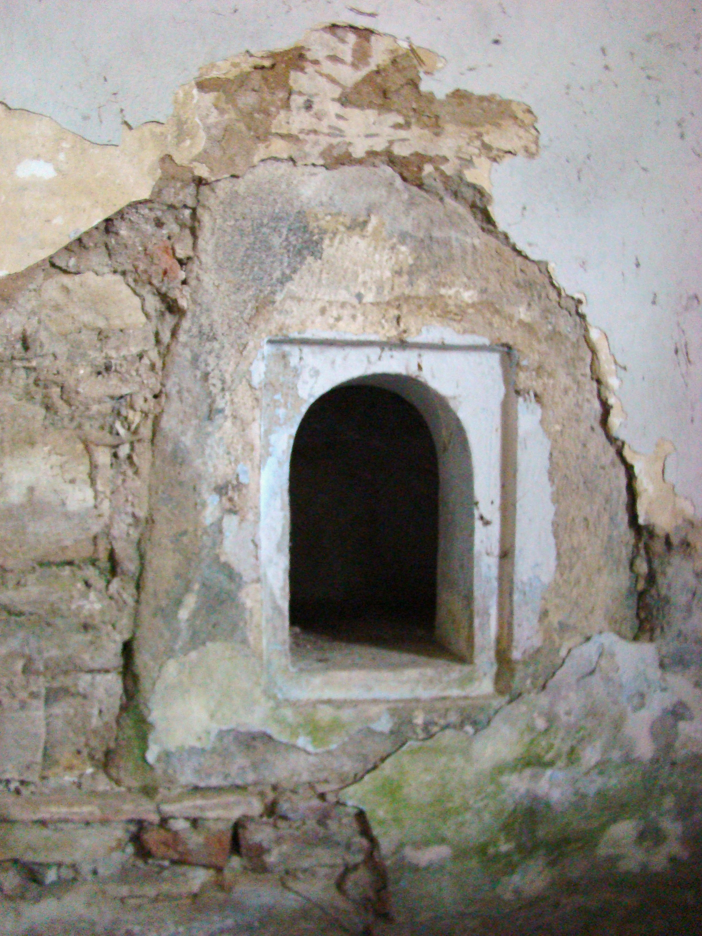 Biserica evanghelică C.A., azi biserica ortodoxă "Sf. Arhg. Mihail si Gavriil", sat CORVINEŞTI; comuna MATEI